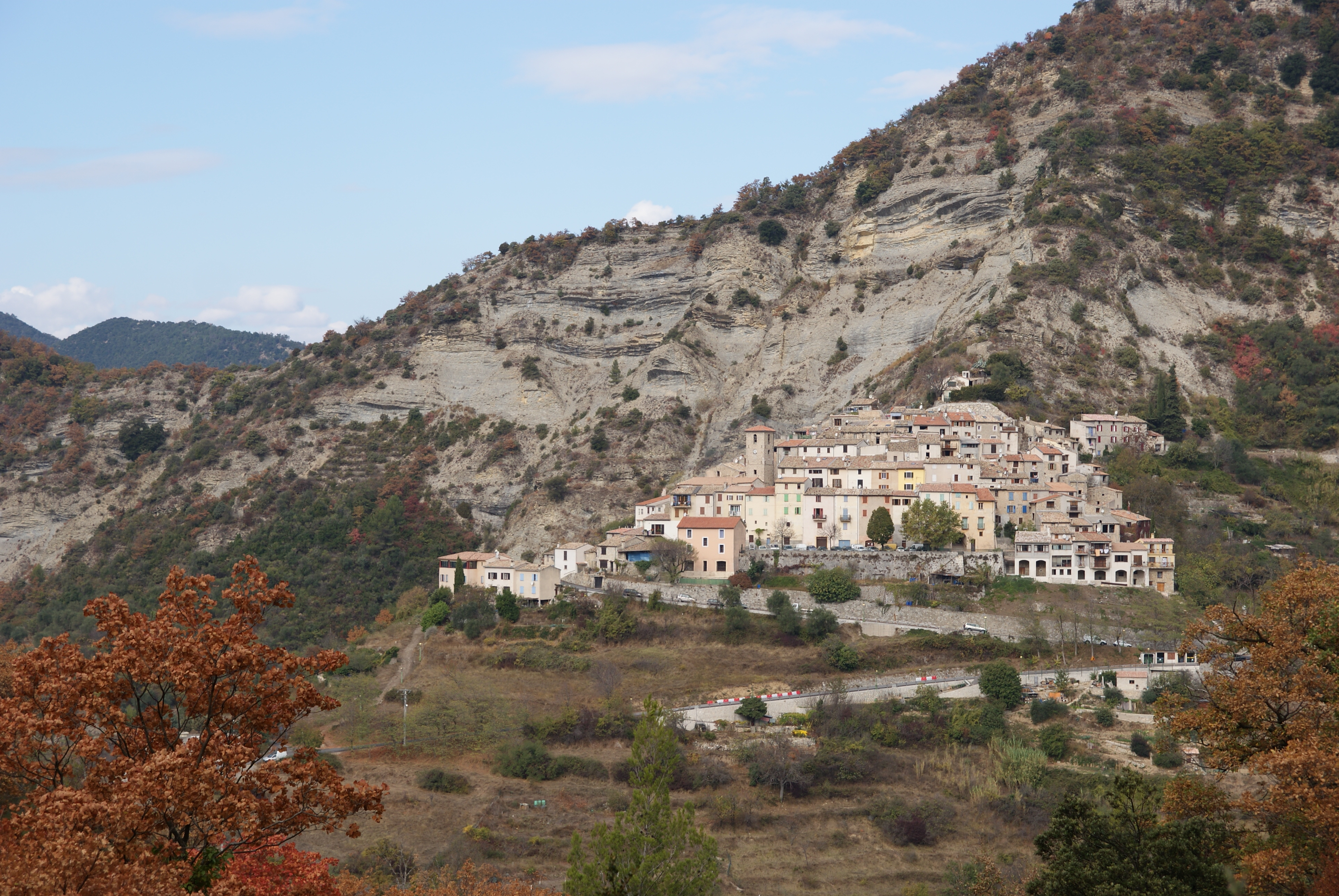 villages Les Ferres, France